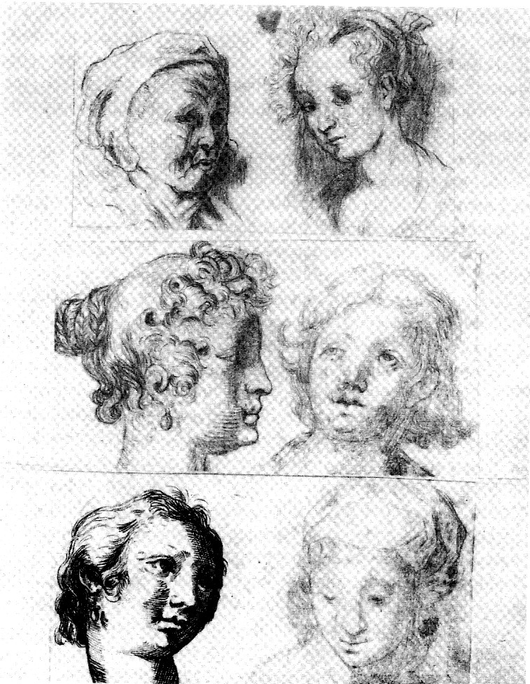 Kopfstudien nach Grafiken und Gemälden.